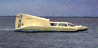 Tandem Airfoil Flairboot Jörg 2 auf der Nordsee